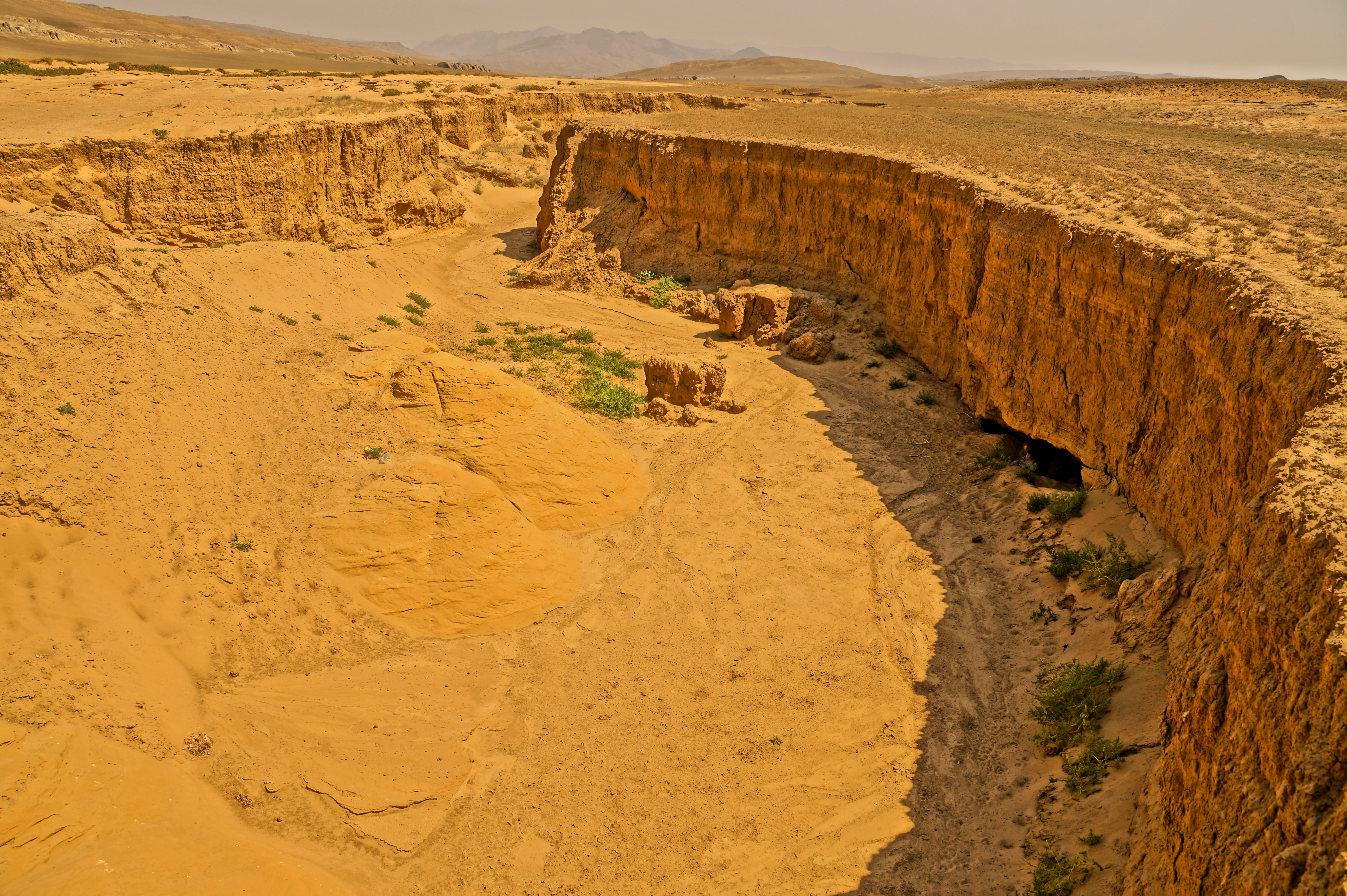 Дагестанский заповедник: Кумторкалинский район, Дагестан This image is related to the protected area of Russia number 0500024